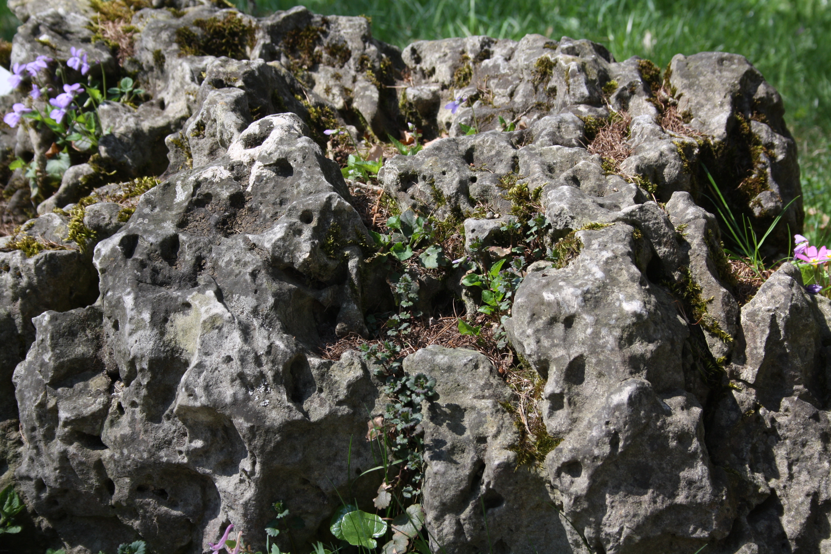 Zellenkalk - Kalkstein mit Lösungsstrukturen. Ca. 150 Mio Jahre alt. Lösungsstrukturen entstanden in den letzten 10 000 Jahren.